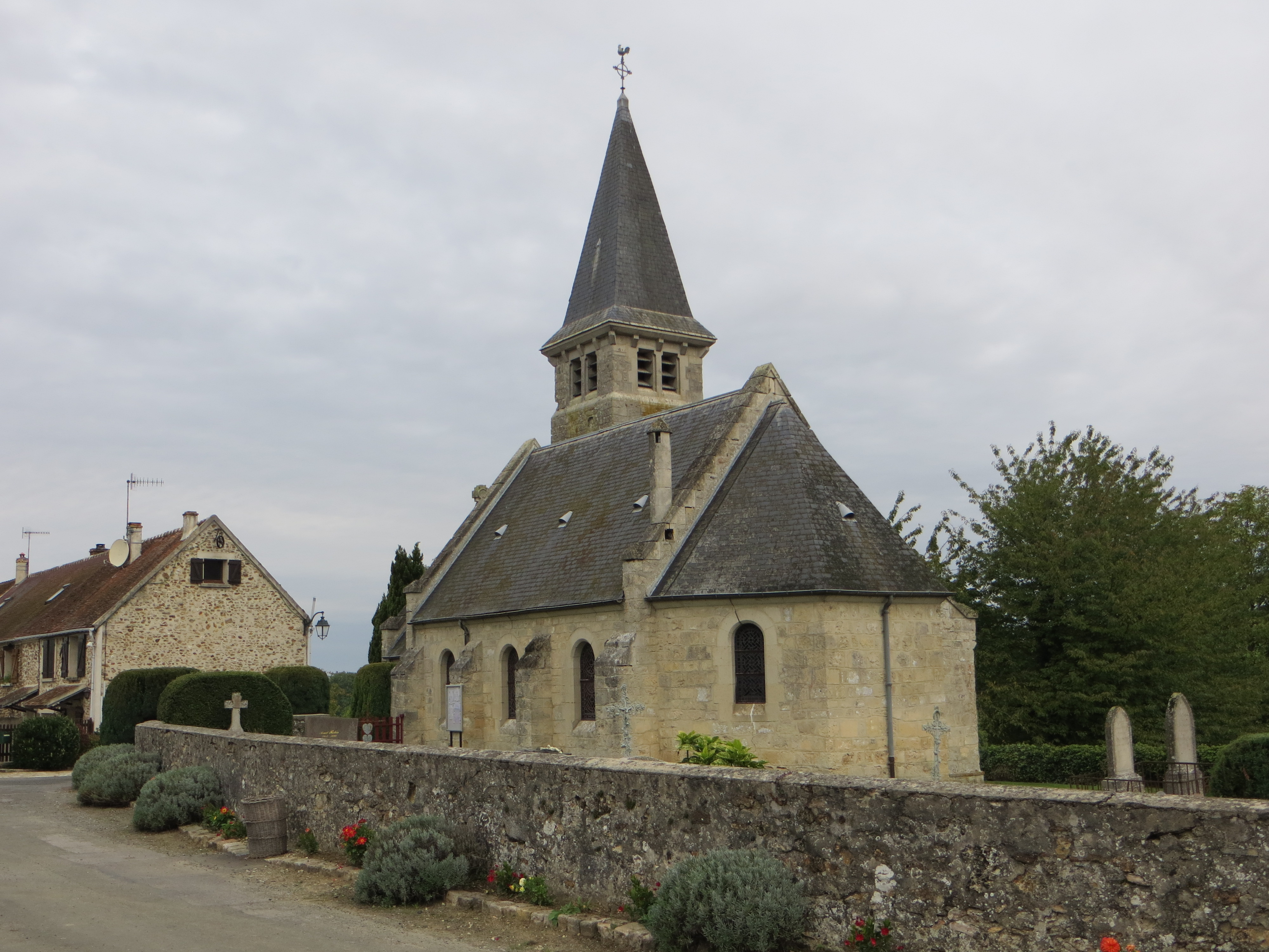 Vue générale de l'église